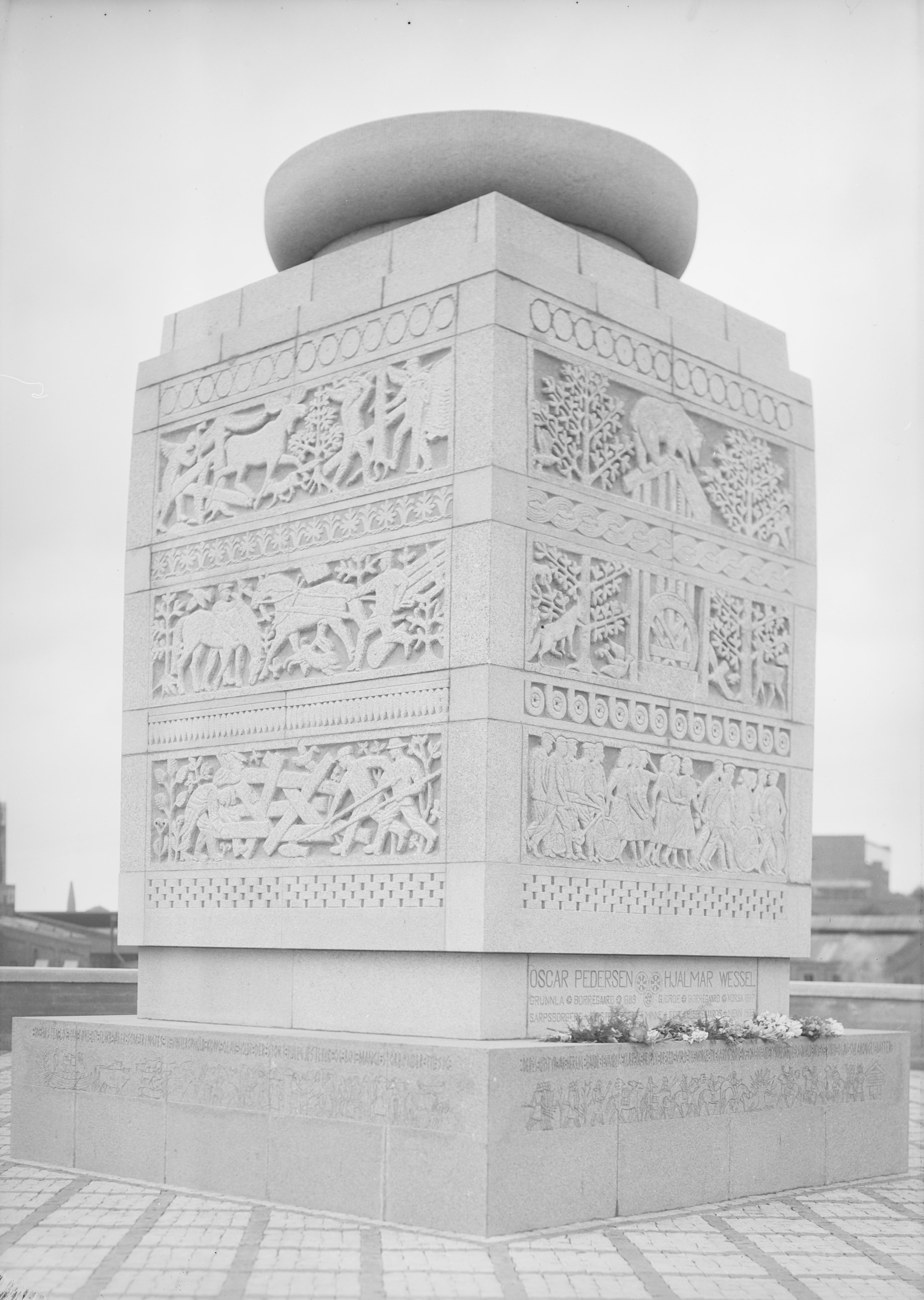 Bildet er hentet fra Nasjonalbibliotekets bildesamling. Anmerkninger til bildet var: Fotograf ukjent. Sarpsborg, Sarpsborg, Østfold